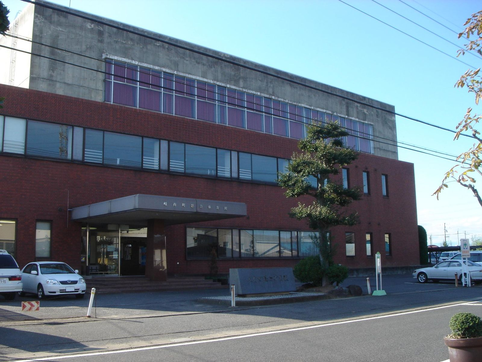 （岐南町総合体育館）,Ginan,Gifu,Japan(岐阜県岐南町)で撮影。